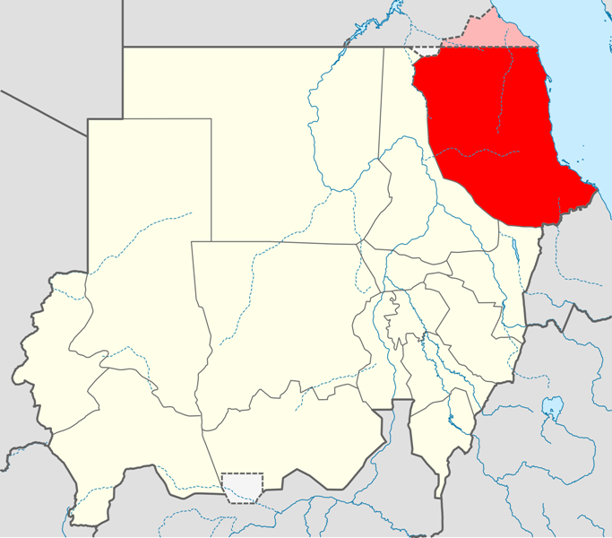 Locator map